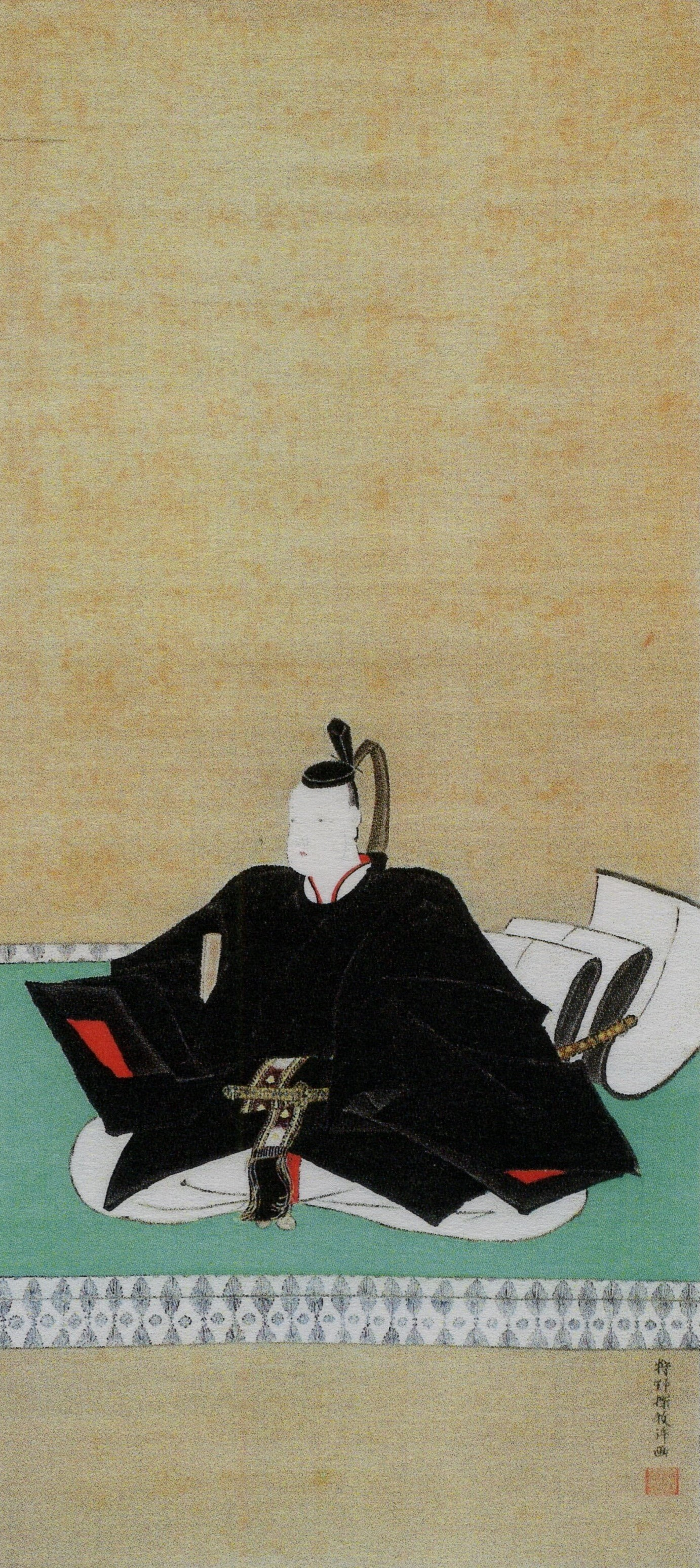 小笠原忠総の肖像。